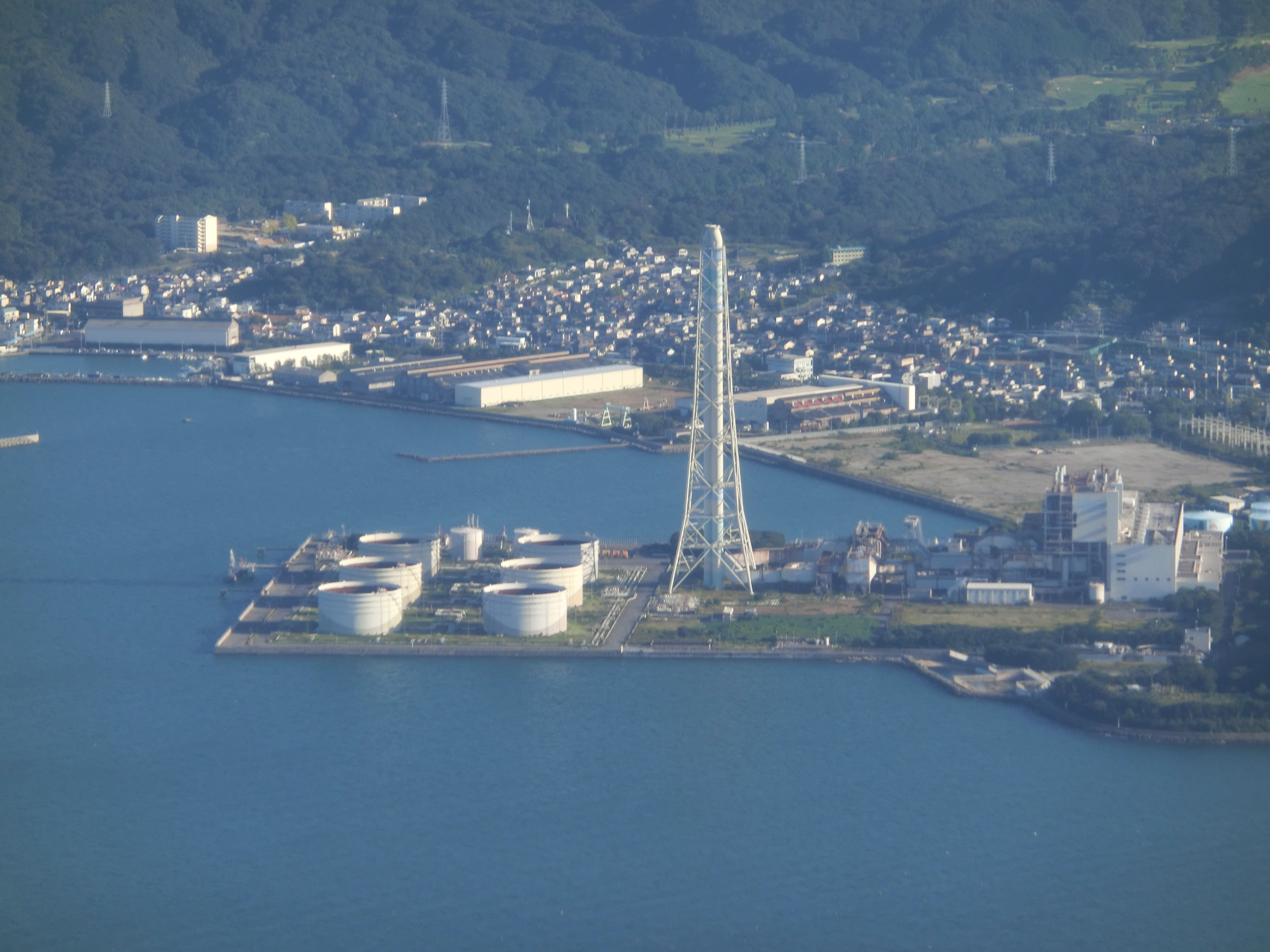 関西電力多奈川第二発電所。航空機より撮影。